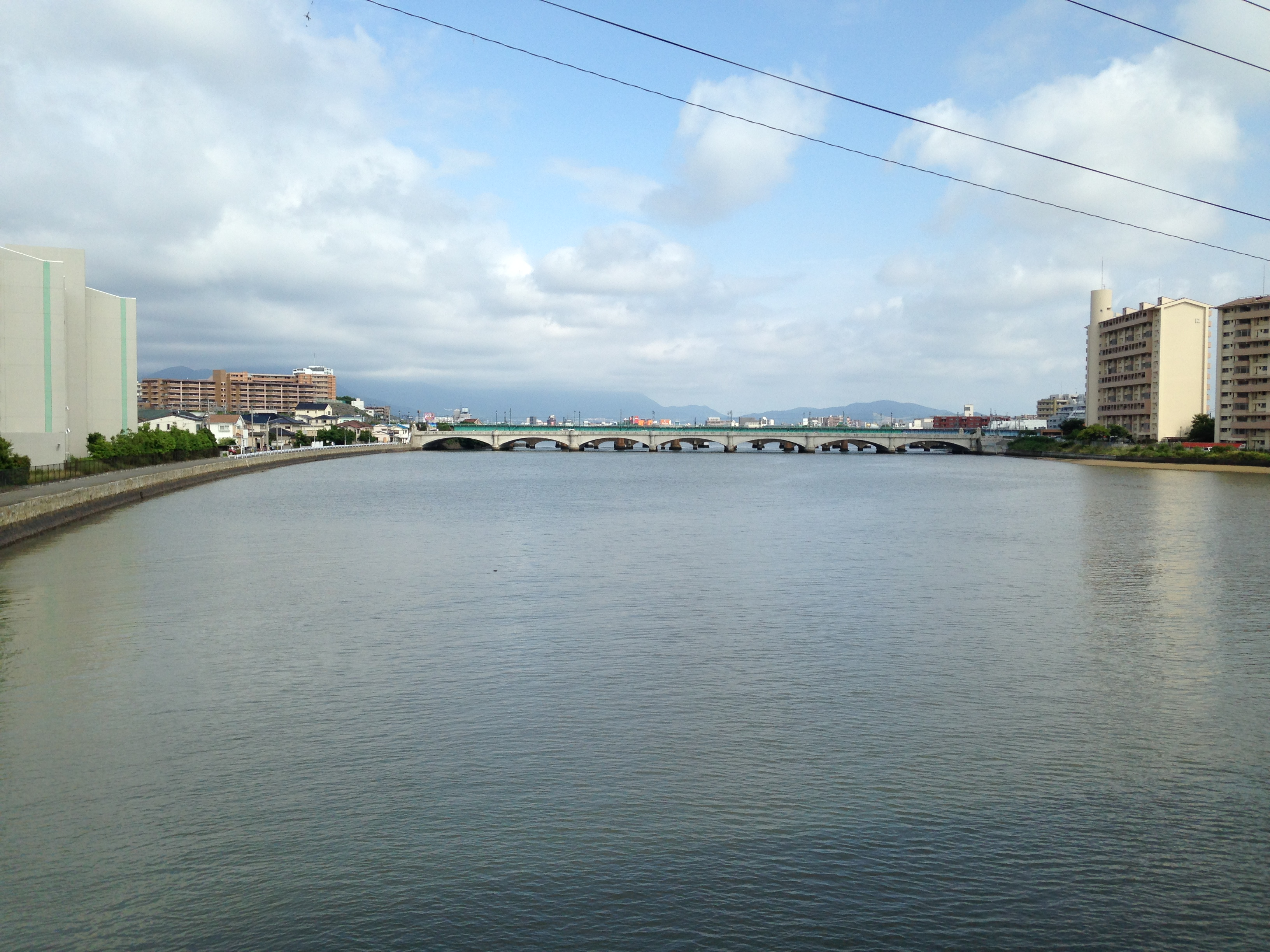 名島弁天橋より望む多々良川(上流側)と名島橋